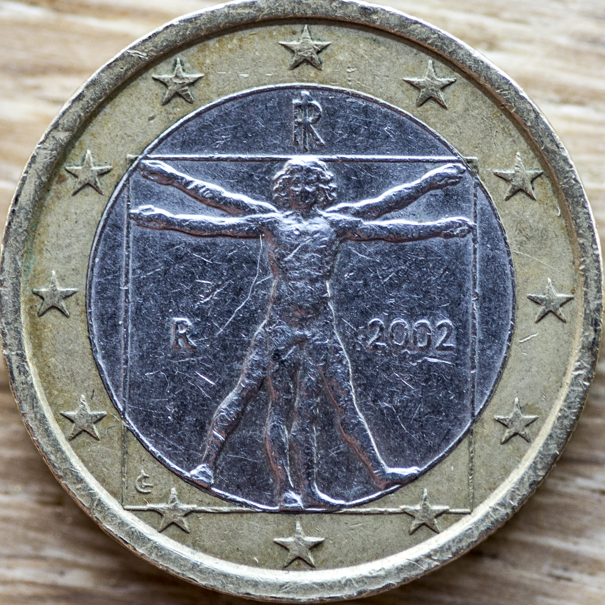 Euro 2002 Italy